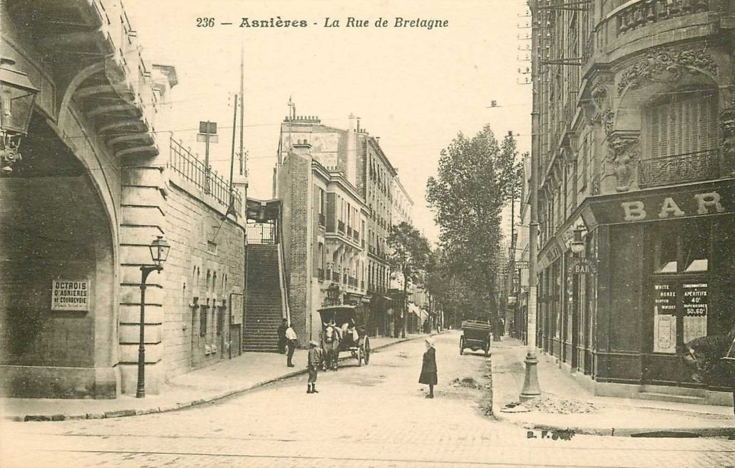 Asnières-sur-Seine.Rue de Bretagne.Tunnel